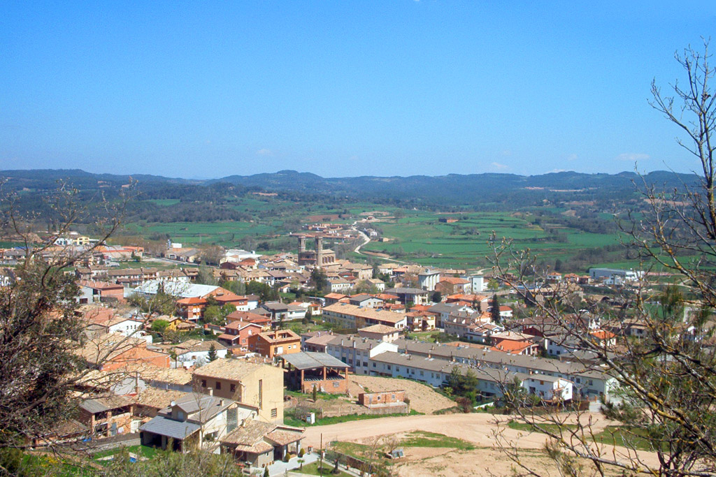 Prop d'Olost, dalt d'un turonet, hi ha l'ermita de Sant Adjutori que té unes magnífiques vistes sobre la comarca i en particular sobre el poble.